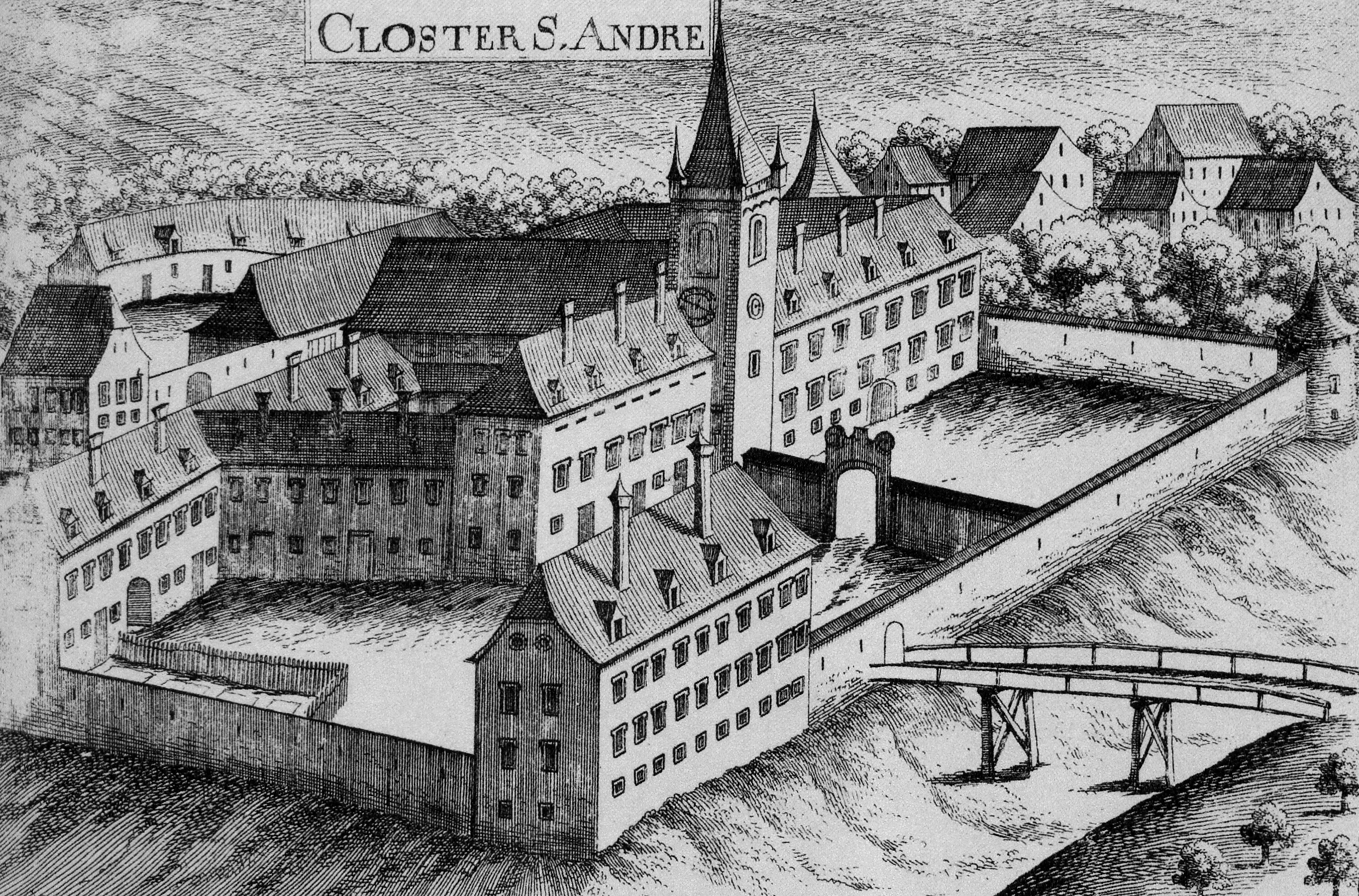 Stich von Georg Matthäus Vischer (1672): Stift Sankt Andrä an der Traisen - Blick von der Nordwesten